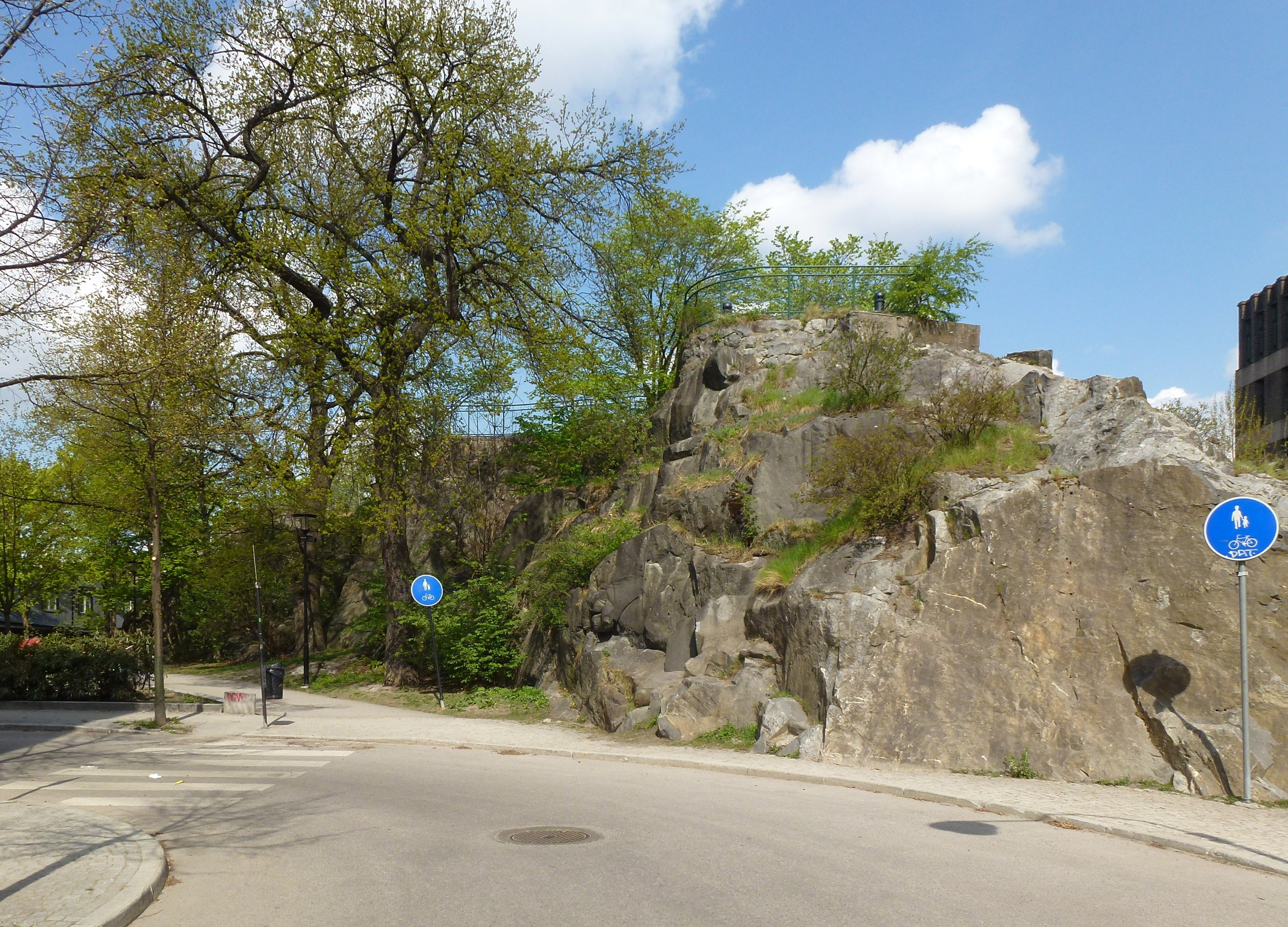 Grubbens kvarnplats 2013